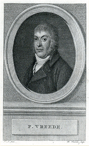 Portrait of Pieter Vreede (1751-1837)